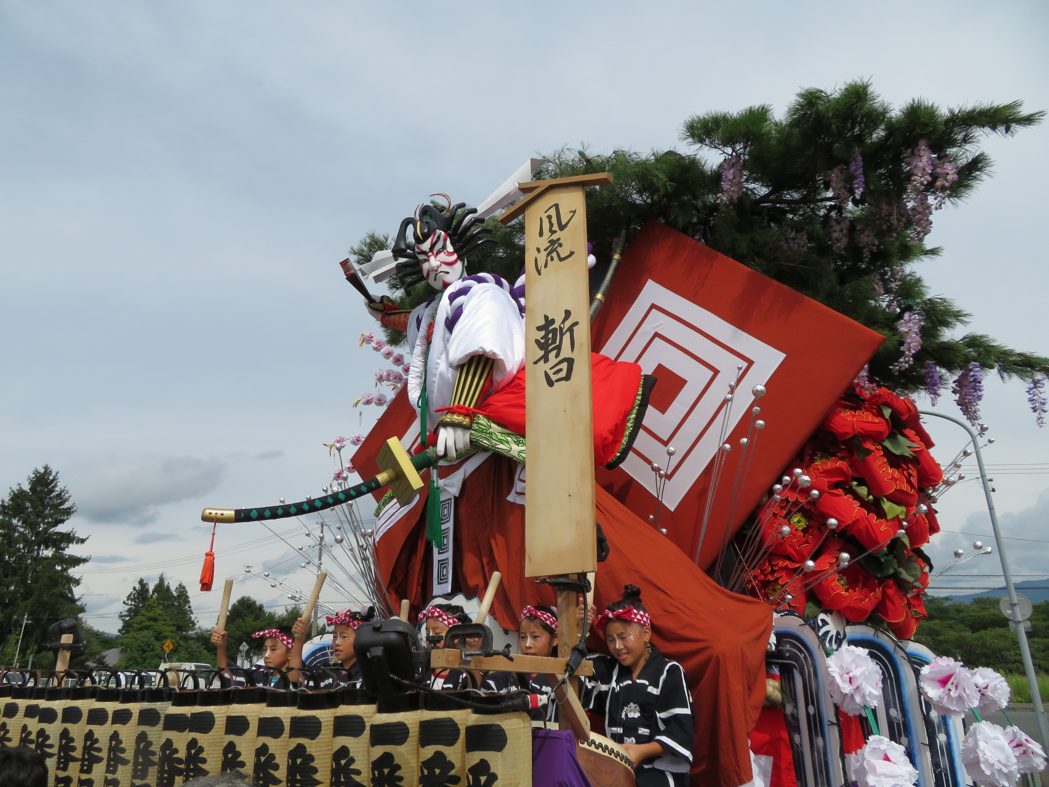 一番組